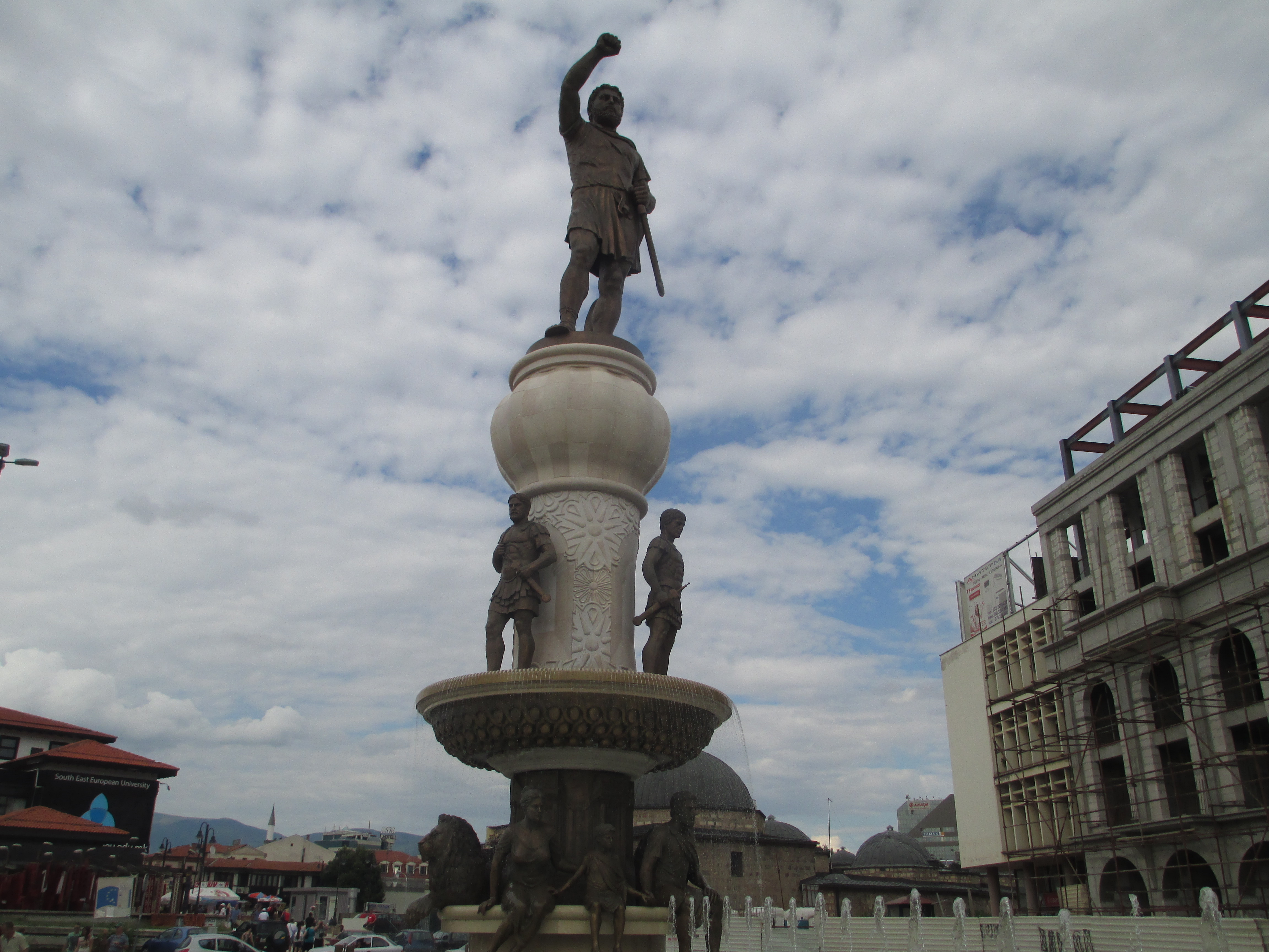 מזרקת פיליפ השני מלך מקדוניה בסקופיה